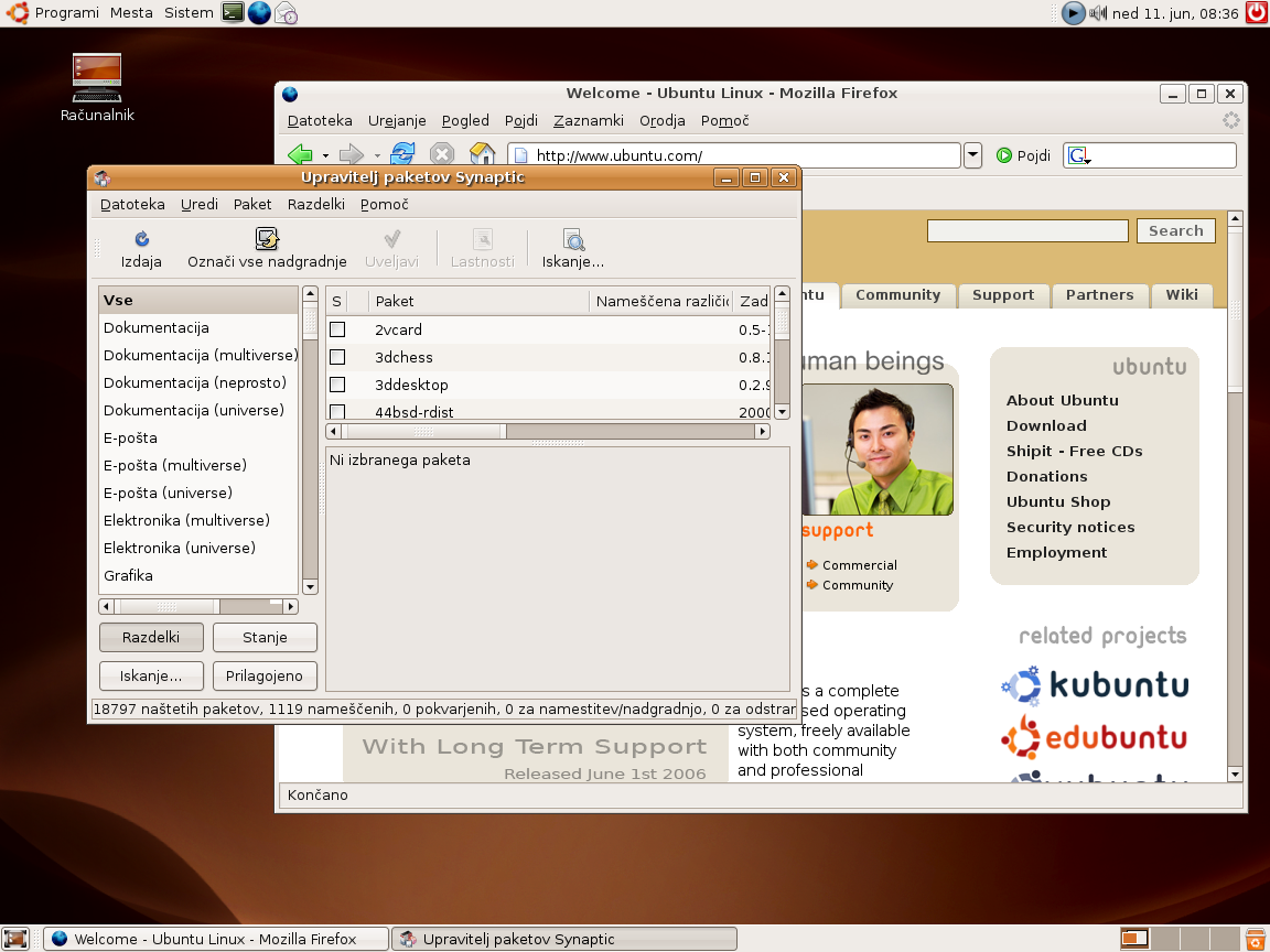 Screenshot sem opravil jaz.